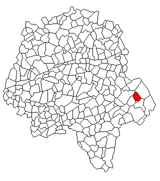 Carte de situation de la commune de Beaumont-Village sur le département d'Indre et Loire